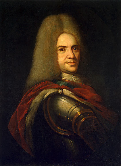 Dolgorukov_Grygory_Fyodorovich (1656-1723)